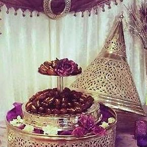 datte au maroc